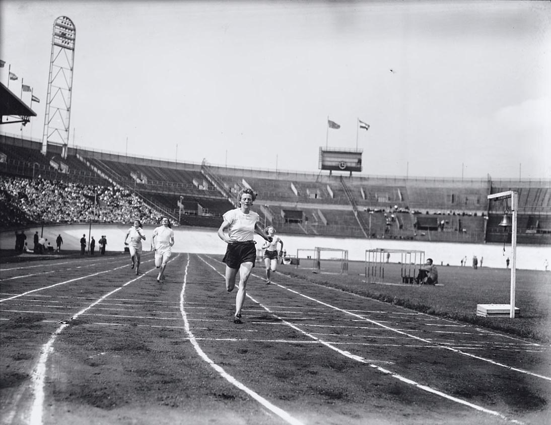 Fanny Blankers-Koen wint de 200 meter tijdens de nationale atletiek-kampioenschappen in het Olympisch Stadion, 3 augustus 1947 Foto Ben van Meerendonk / AHF, collectie IISG, Amsterdam